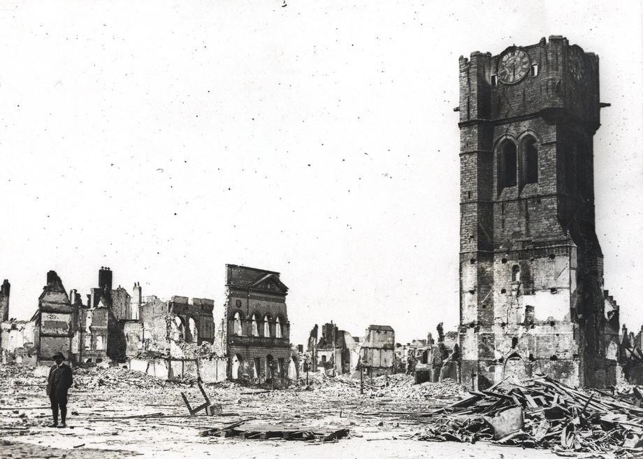 Grand'Place de la ville de Béthune en juillet 1918 après des bombardements de l'armée allemande.